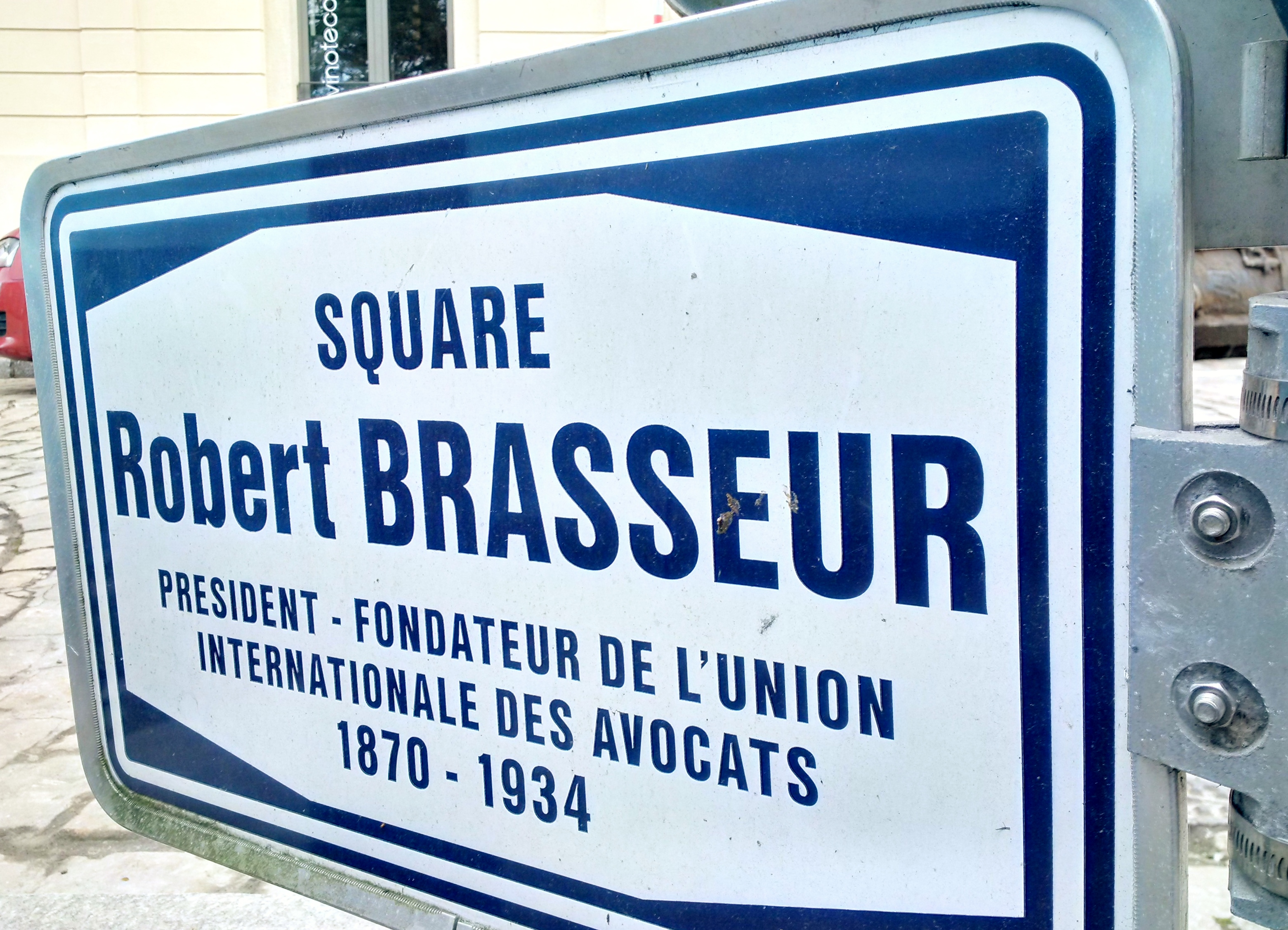 Stroosseschëld an der Uewerstad vun der Stad Lëtzebuerg